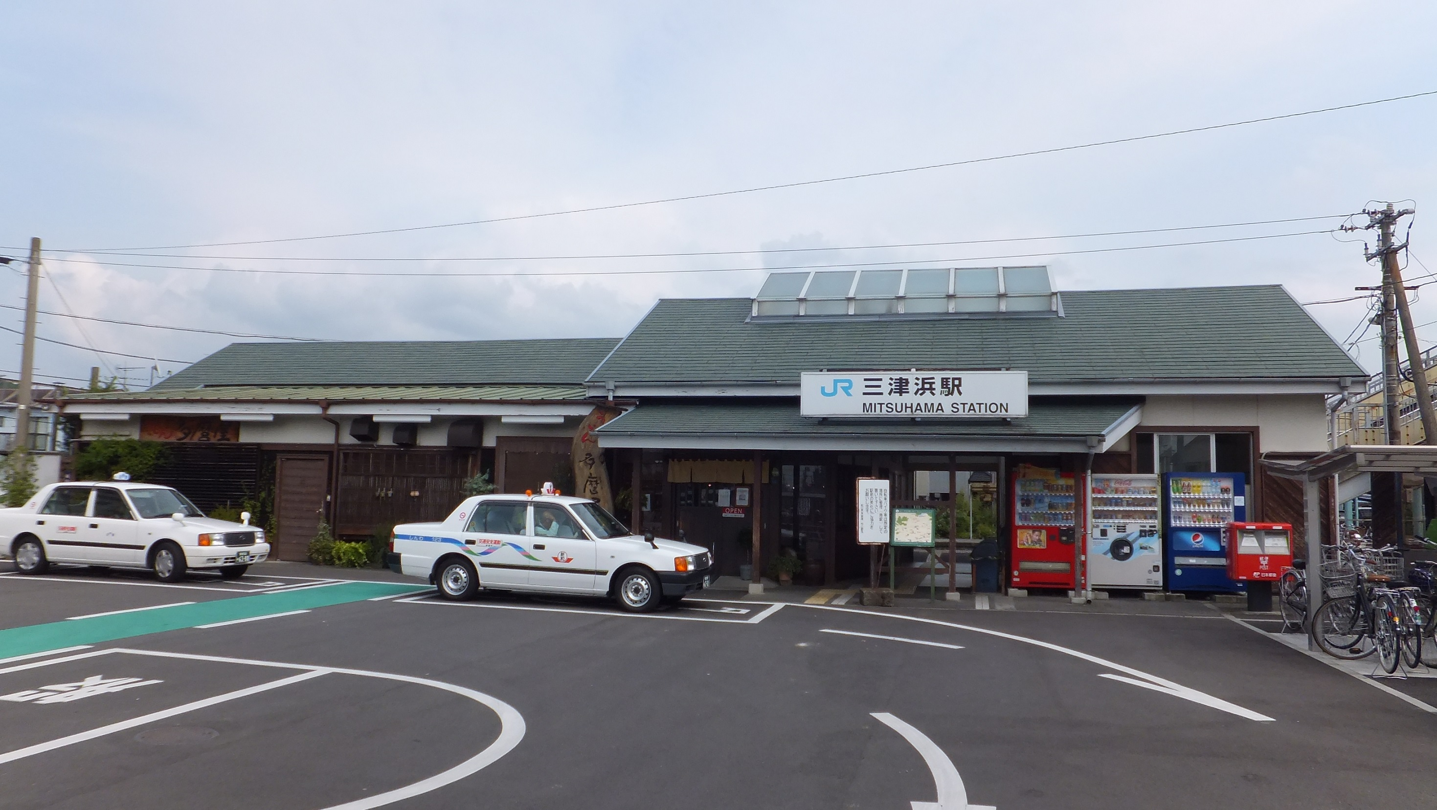 JR予讃線 三津浜駅 （愛媛県松山市） 2015年9月